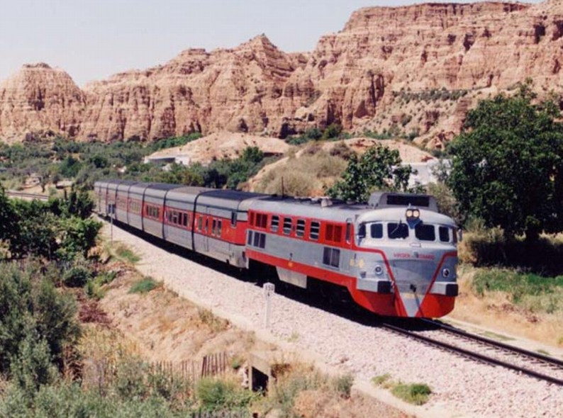 Tren Talgo III, con locomotora serie 352, cerca de Guadix, mediados de los 90.